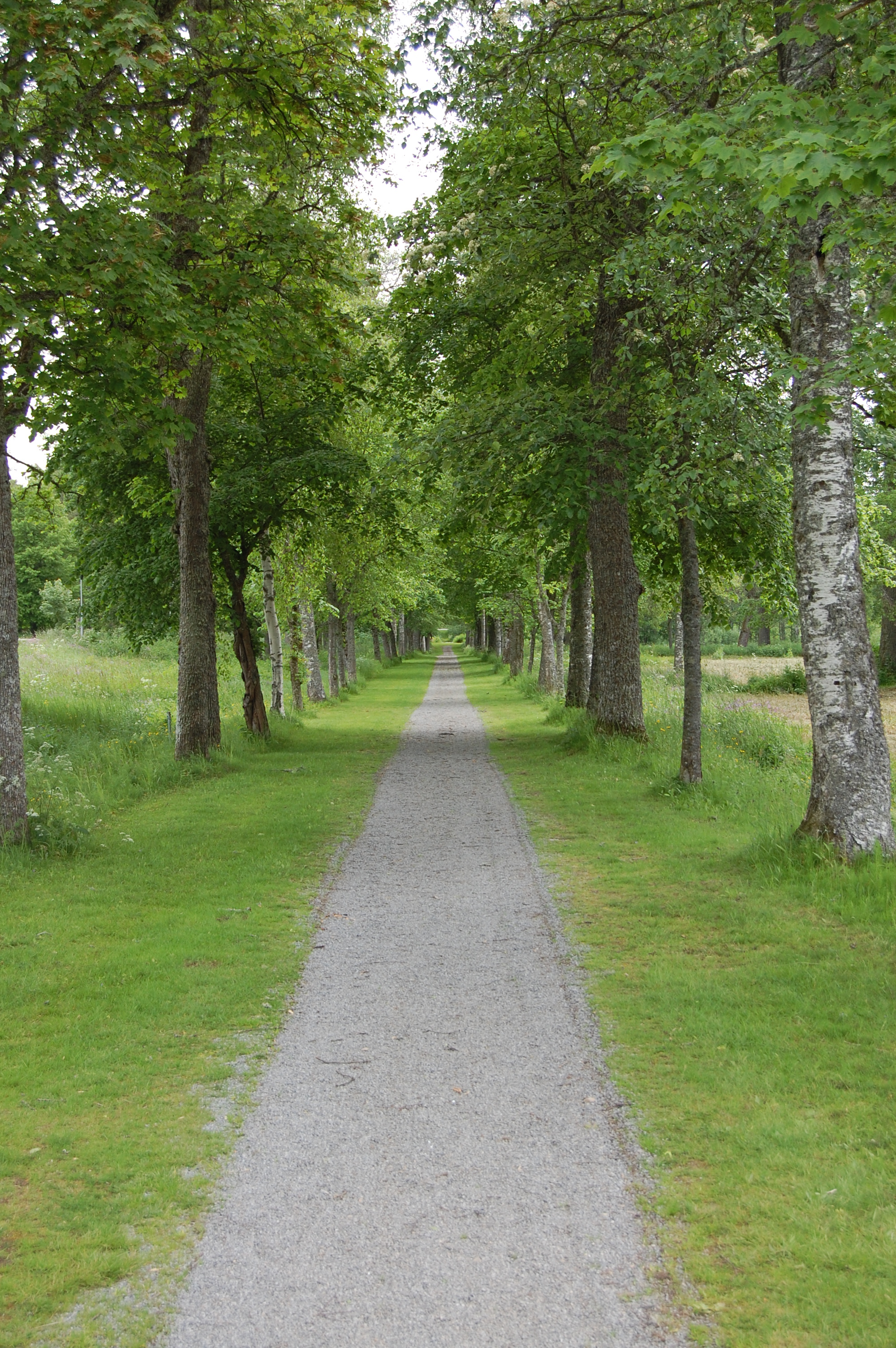 Brudallén på Sätra brunn (kurort) går mellan Brudkällan och Trefaldighetskällan. Denna allé är den längsta på området.